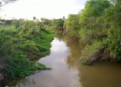 RIACHO EL PORTEÑO QUE NACE EN EL ESTERO PATIÑO Y DESEMBOCA EN EL RIO PARAGUAY.